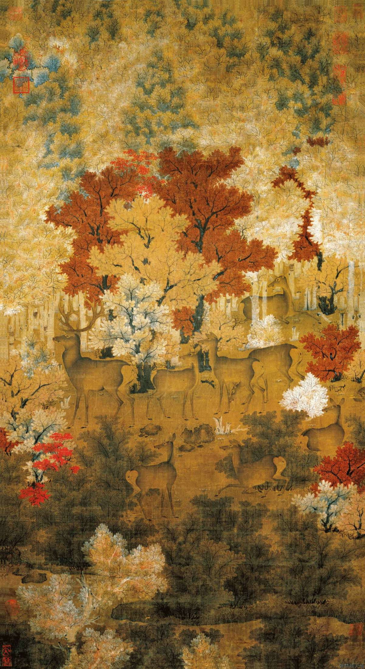 遼代名畫《丹枫呦鹿图》